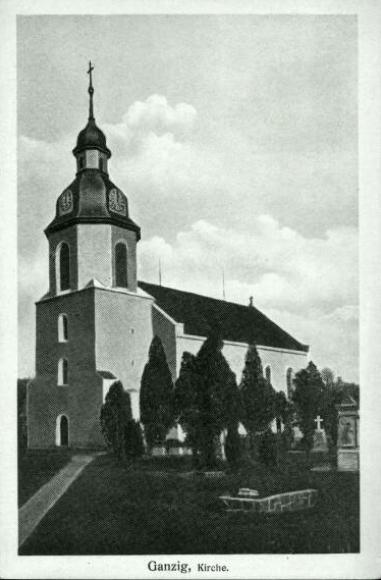 Kirche in Ganzig (Liebschützberg): Scan Ansichtskarte 1910